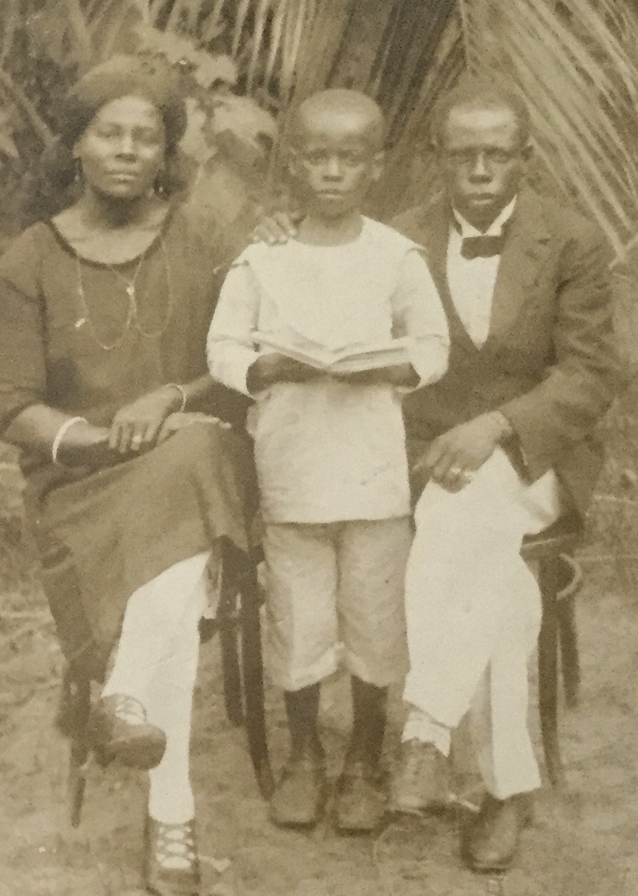 autorisation de diffusion et sa publication dans Wikipedia aux conditions 4.0